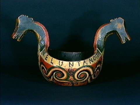 Kjenge fra Voss i Hordaland. Datert 1791. Innskrift: "DRIK DET ER DIG WEL UNT 1791". Lengde 42 cm. Norsk Folkemuseum. NF.1992-0617.